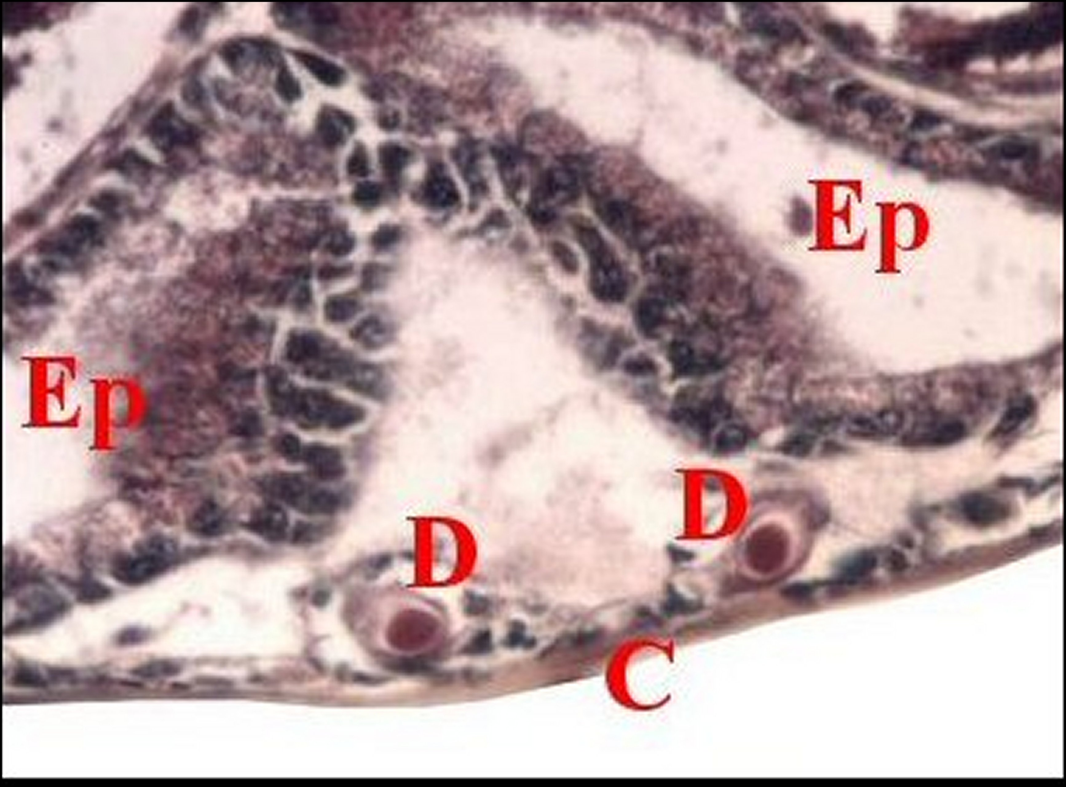 Pholcus phalangioides, région épigastrique : deux glandes prégonoporales et leurs canaux excréteurs en coupe histologique transversale.